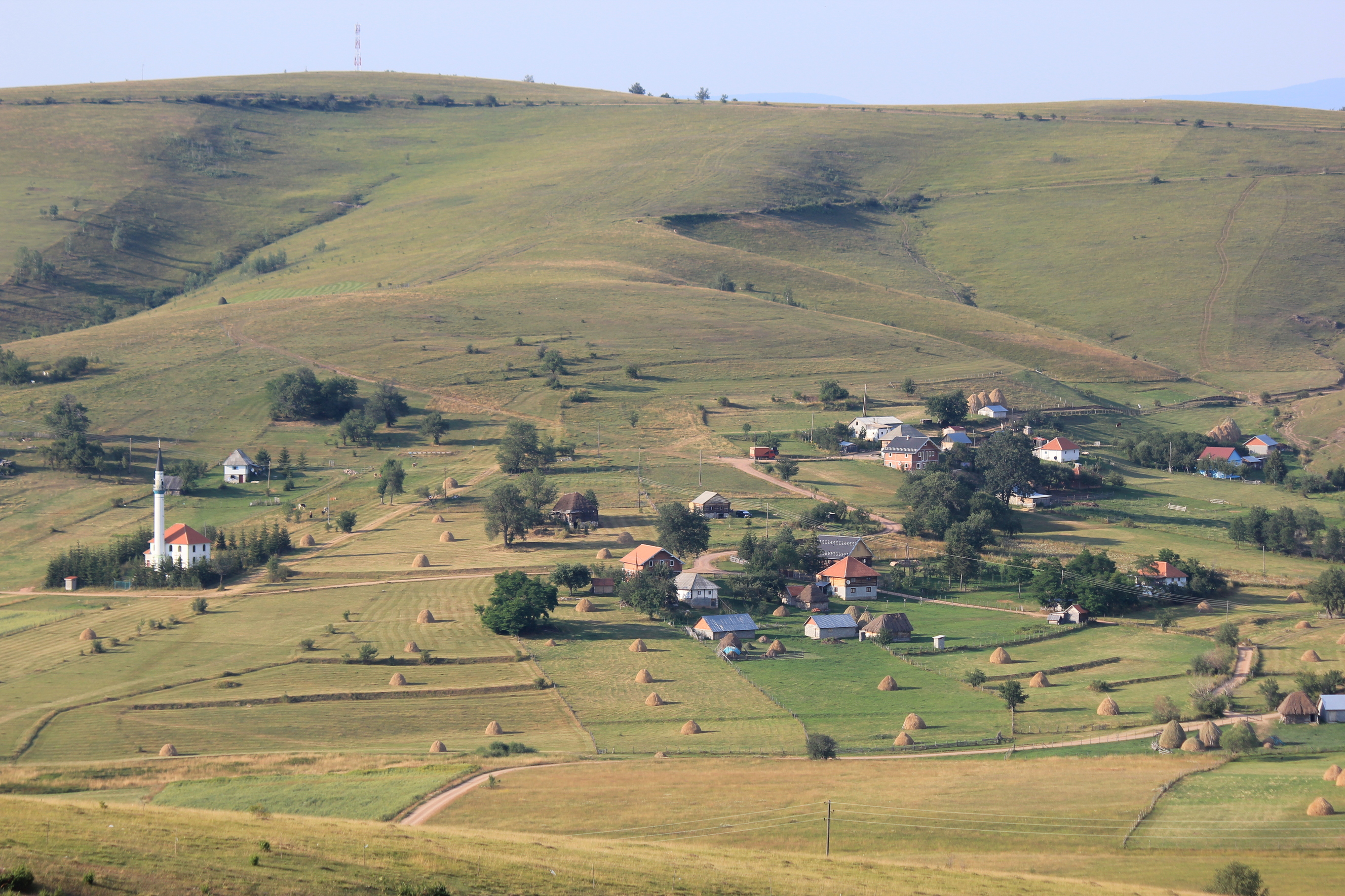 Landschaft im Sandschak von Novi Pazar zwischen Sjenica und Tutin, Serbien.Hornjoserbsce: Krajina w Nowopazarskim Sandźaku mjeze Sjenicu a Tutinom, Serbiska.